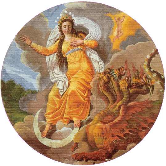 Agostino Comerio, la Donna e il Drago, affresco del 1824 nel Santuario della Madonna della Bocciola, Ameno (NO)